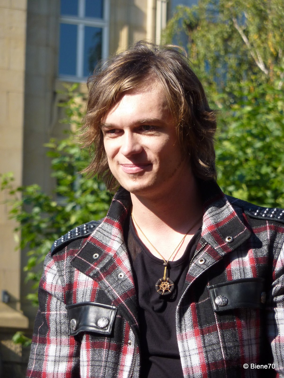 Thomas Godoj beim Videodreh in Recklinghausen am 22.9.09